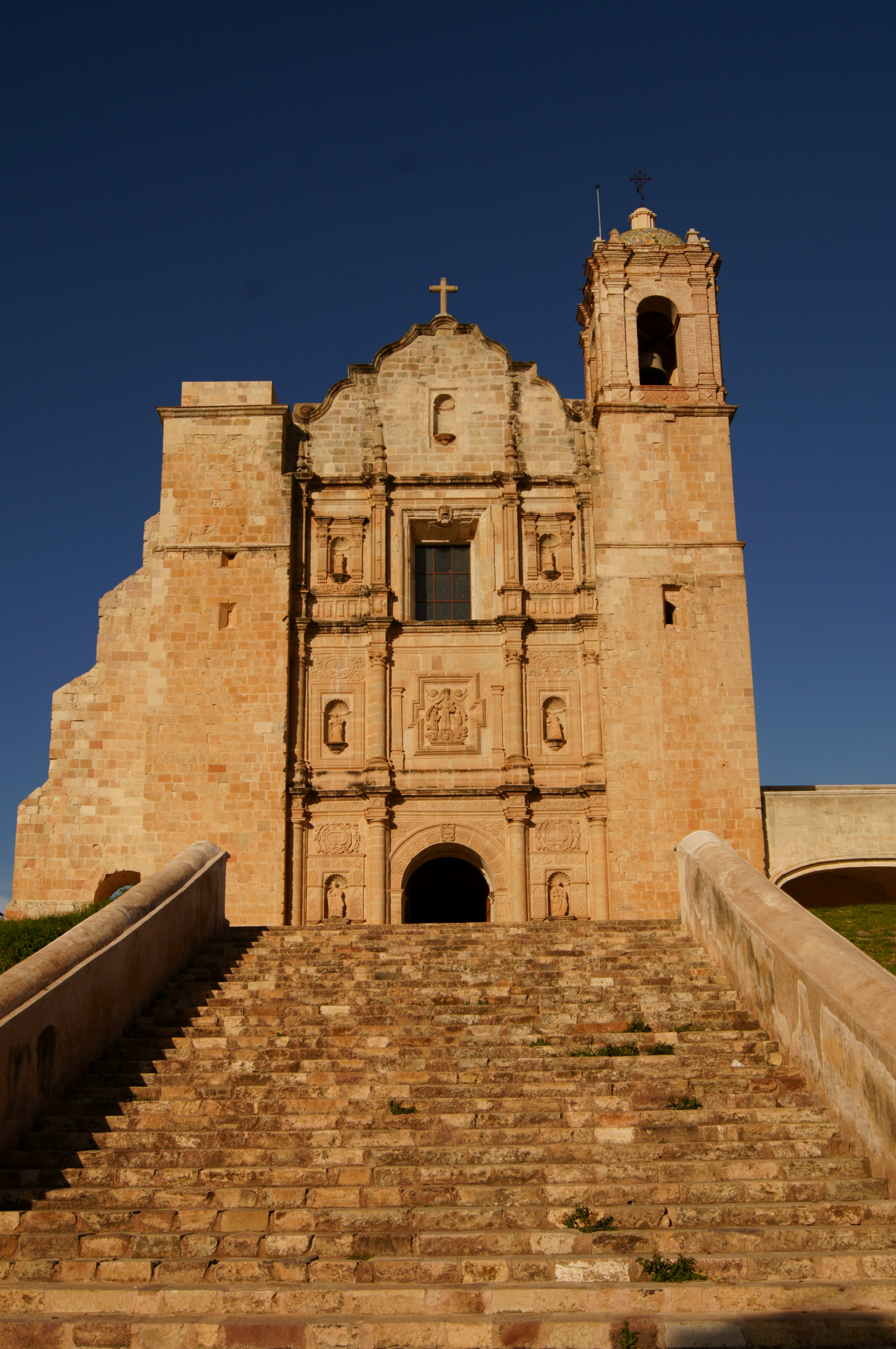 entrada principal del templo